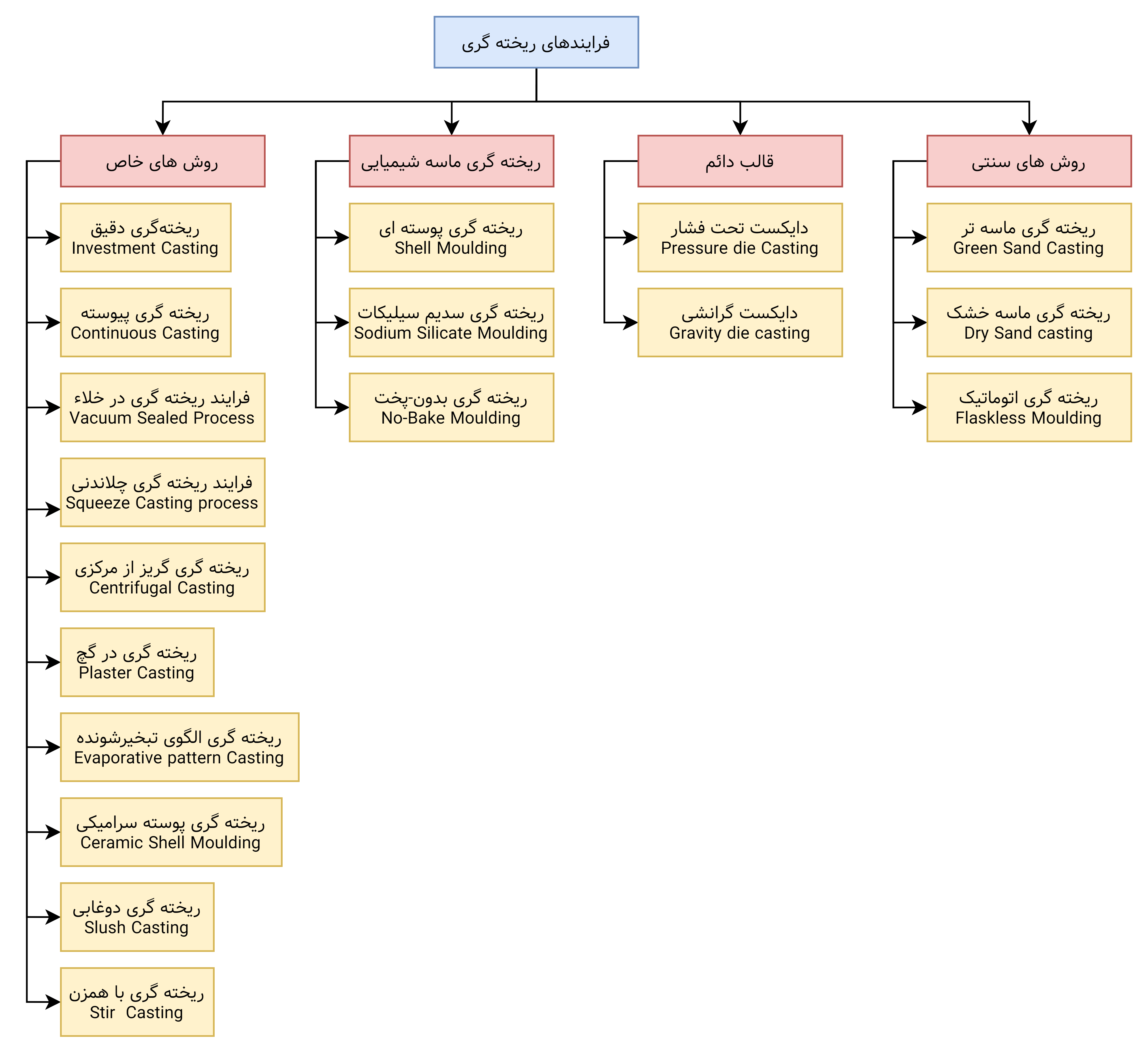 die casting